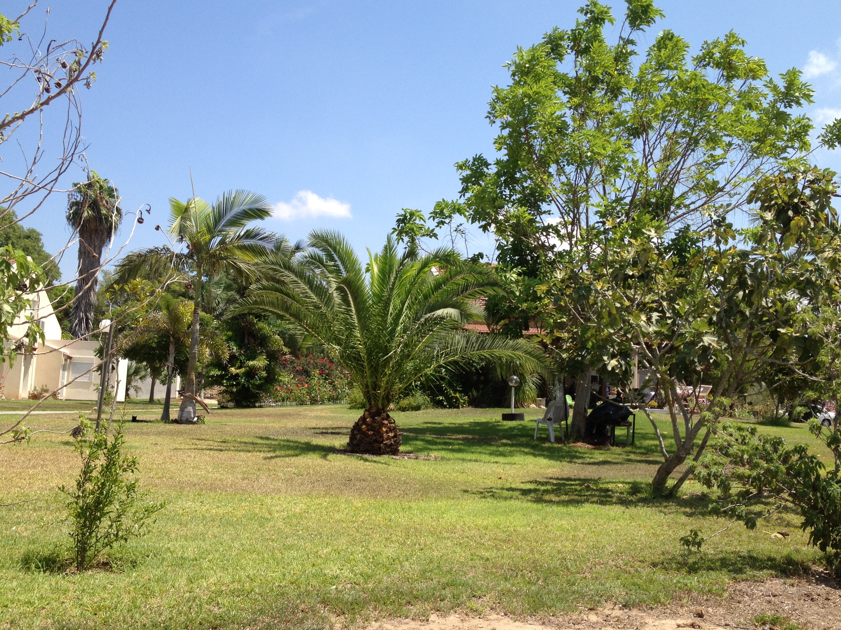 קיבוץ כרמיה, מ.א חוף אשקלון